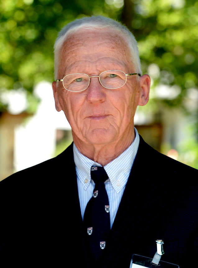 Das Photo stellt Geerd HF Diercksen dar. Es wurde aufgenommen auf der Jahrestagung der Alexander von Humboldt Stiftung in Berlin im Jahr 2013.